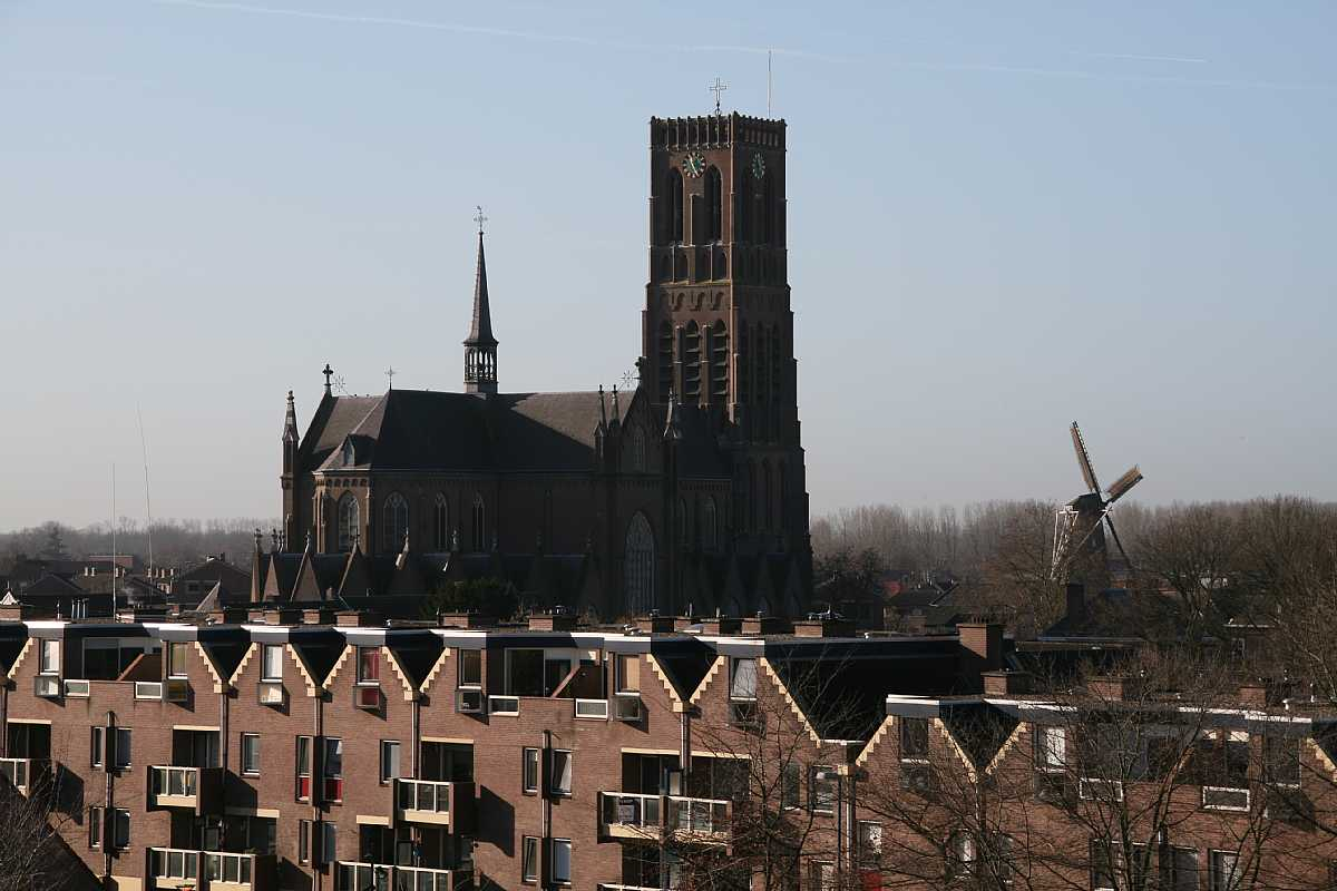 De grote kerk Oss (North Brabant, NL)